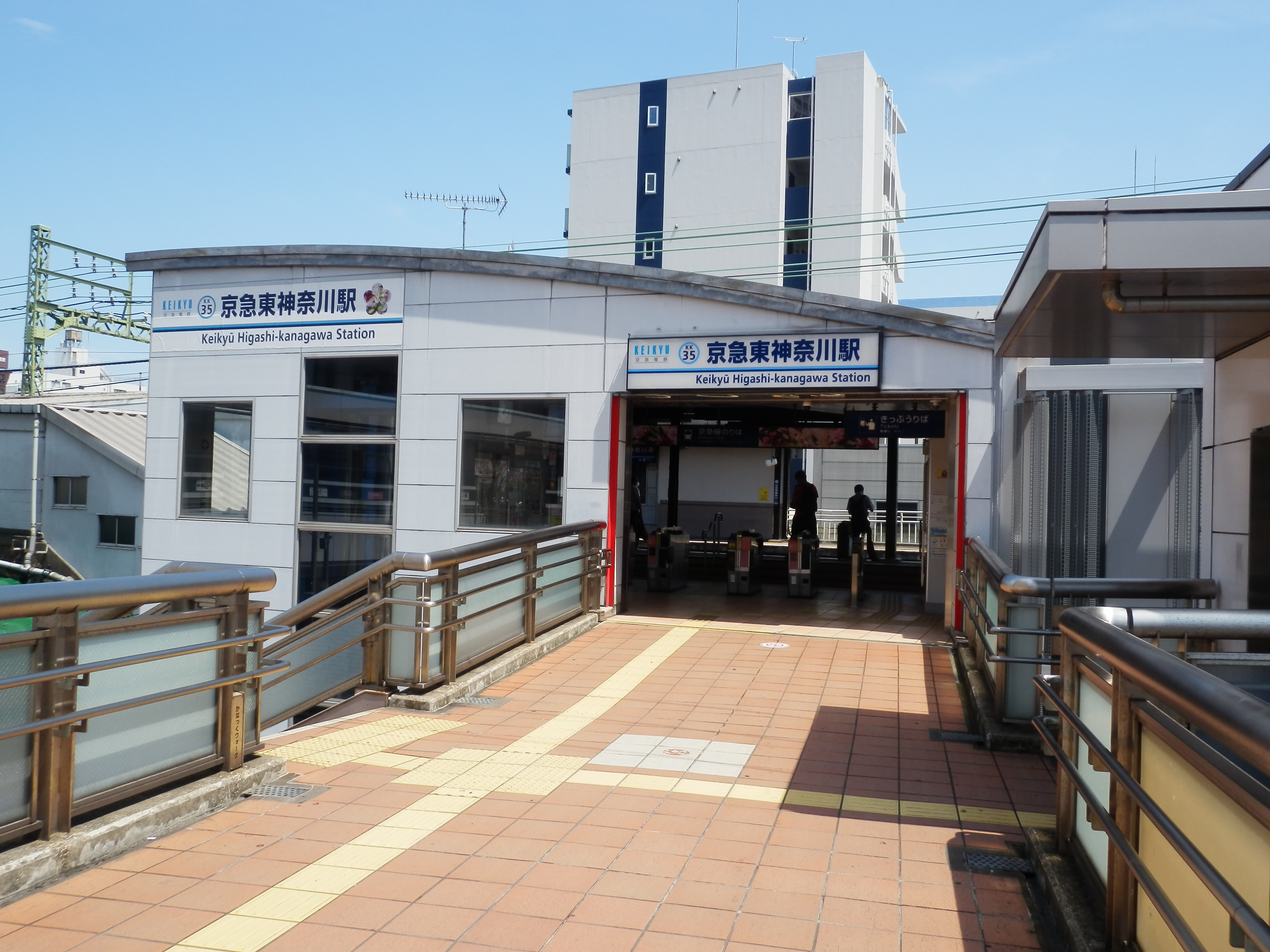 京急東神奈川駅駅舎